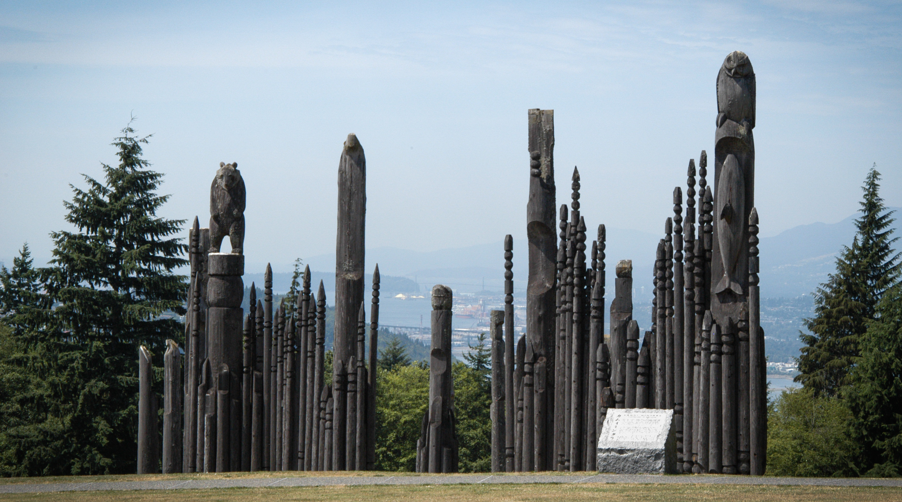 Kamui Mintara Totems. Seen in Stargate SG-1 episode #403 "Upgrades".